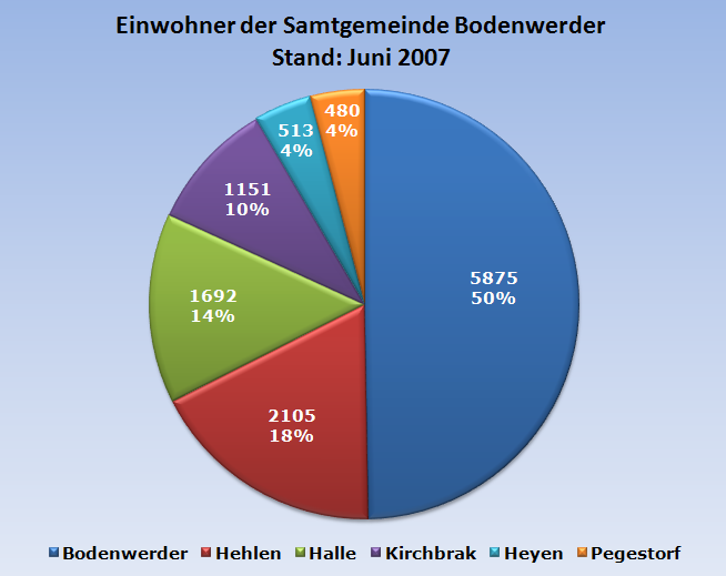 Bevölkerungstatistik: Einwohnerstand der Mitgliedsgemeinden der Samtgemeinde Bodenwerder zum 30. Juni 2007 nach Datenstand des Niedersächsischen Landesamtes für Statistik (NLS).